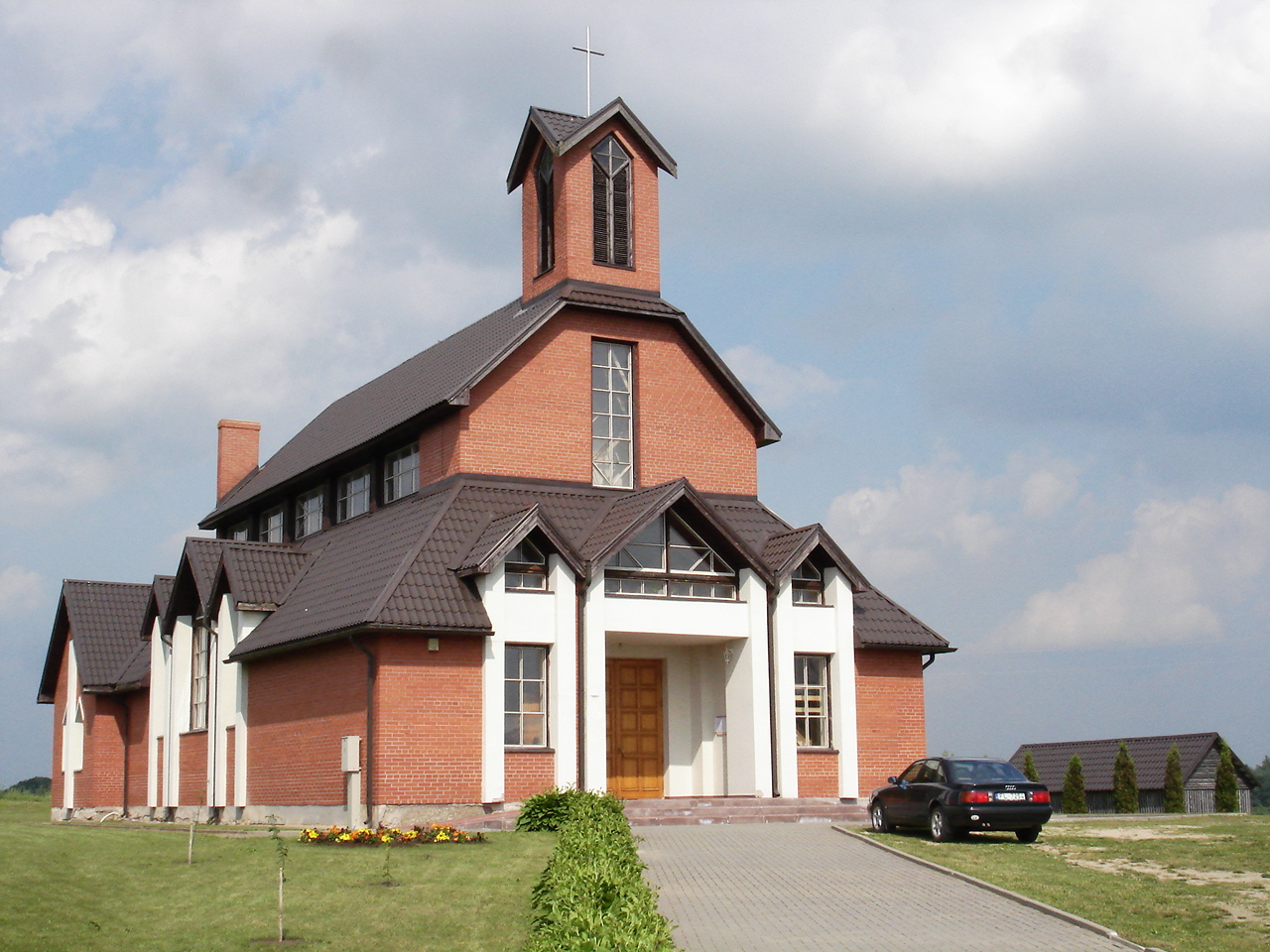 Neretas katoļu baznīca